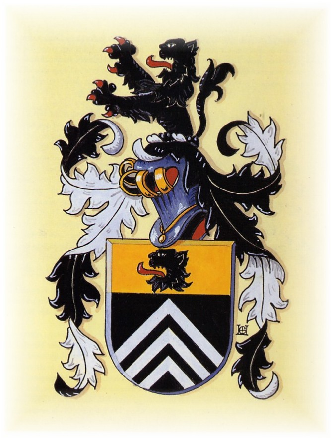 Wapen Familiestichting Receveur